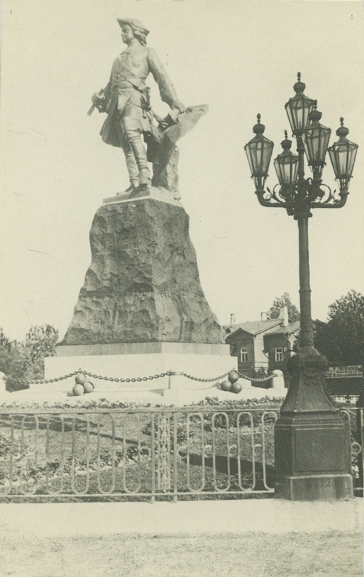 Peeter Suure ausammas, 1910